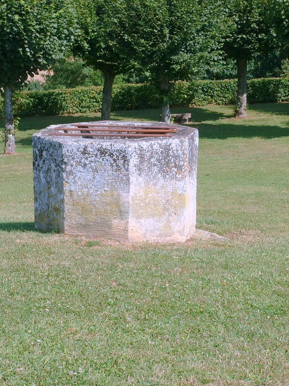 Montréal (Yonne) : puits de l'ancien château